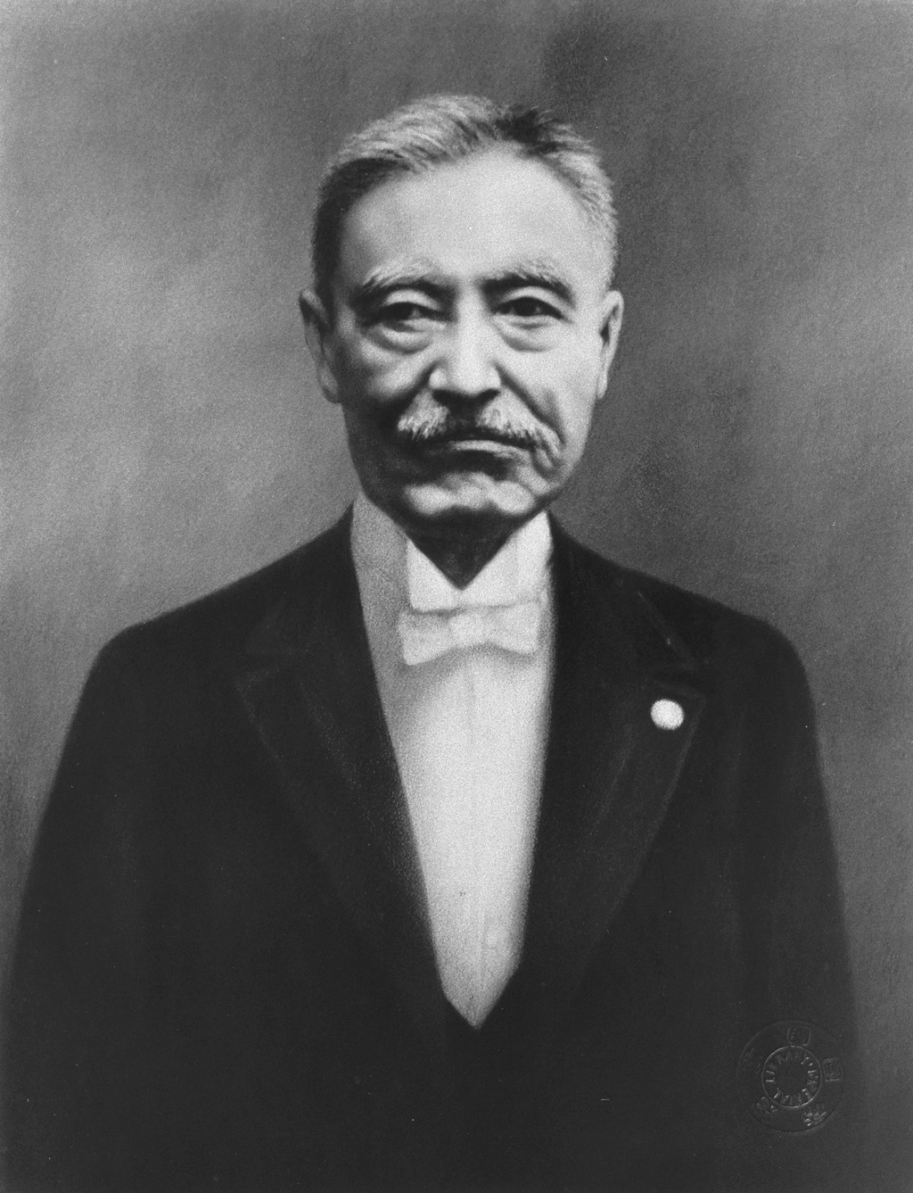 Portrait of Shimada Saburo (島田三郎, 1852 – 1923)